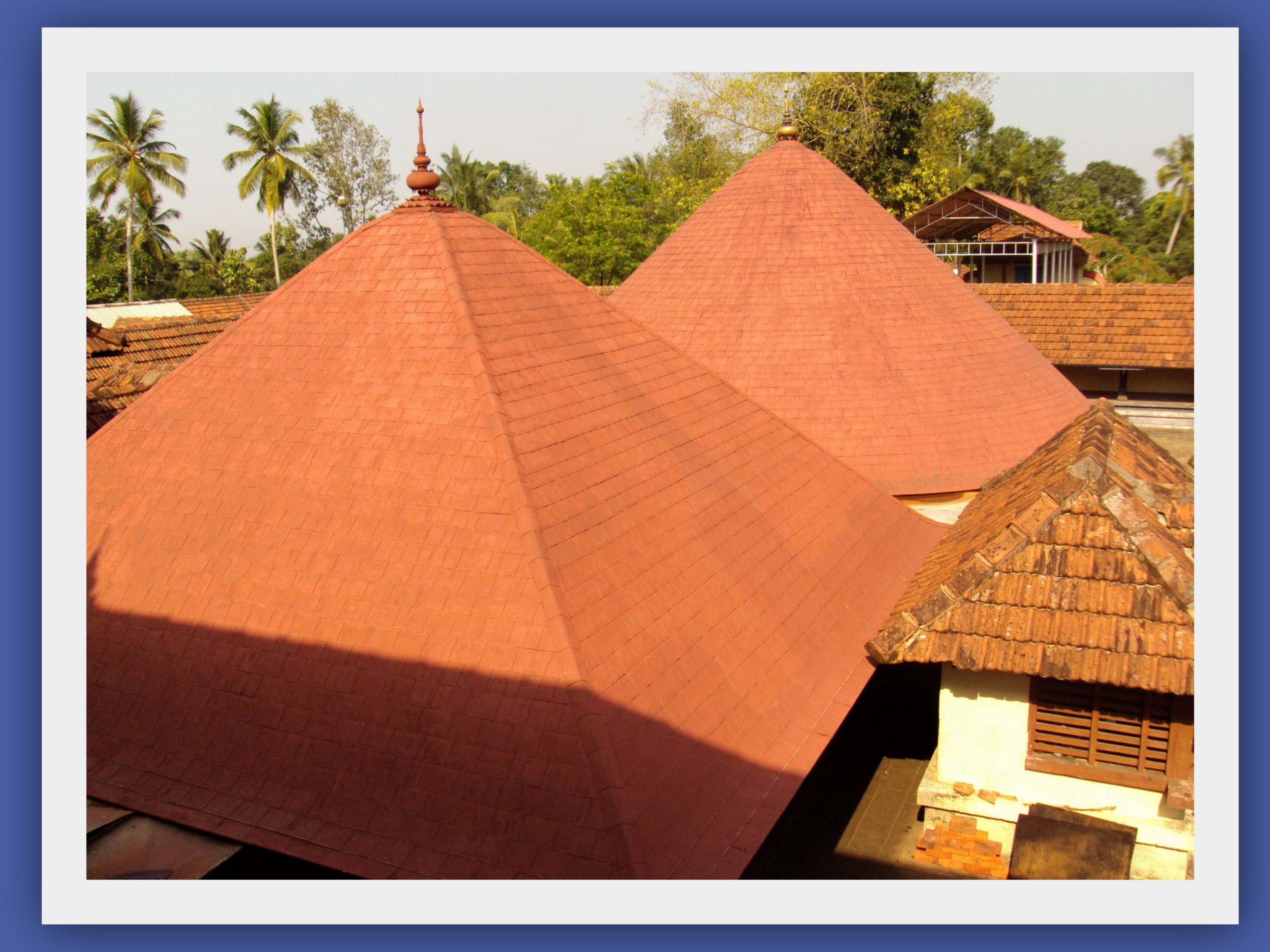 നമസ്കാരമണ്ഡപം